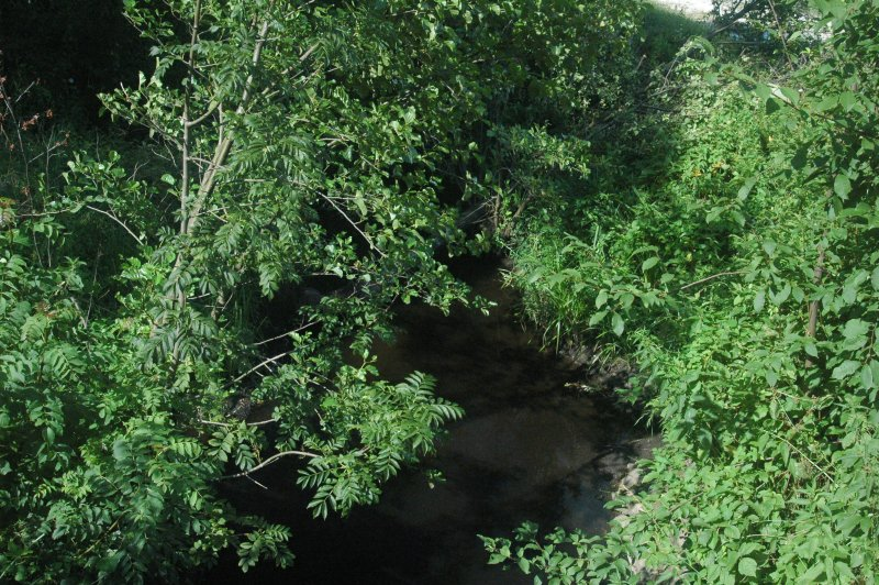 Rudava river